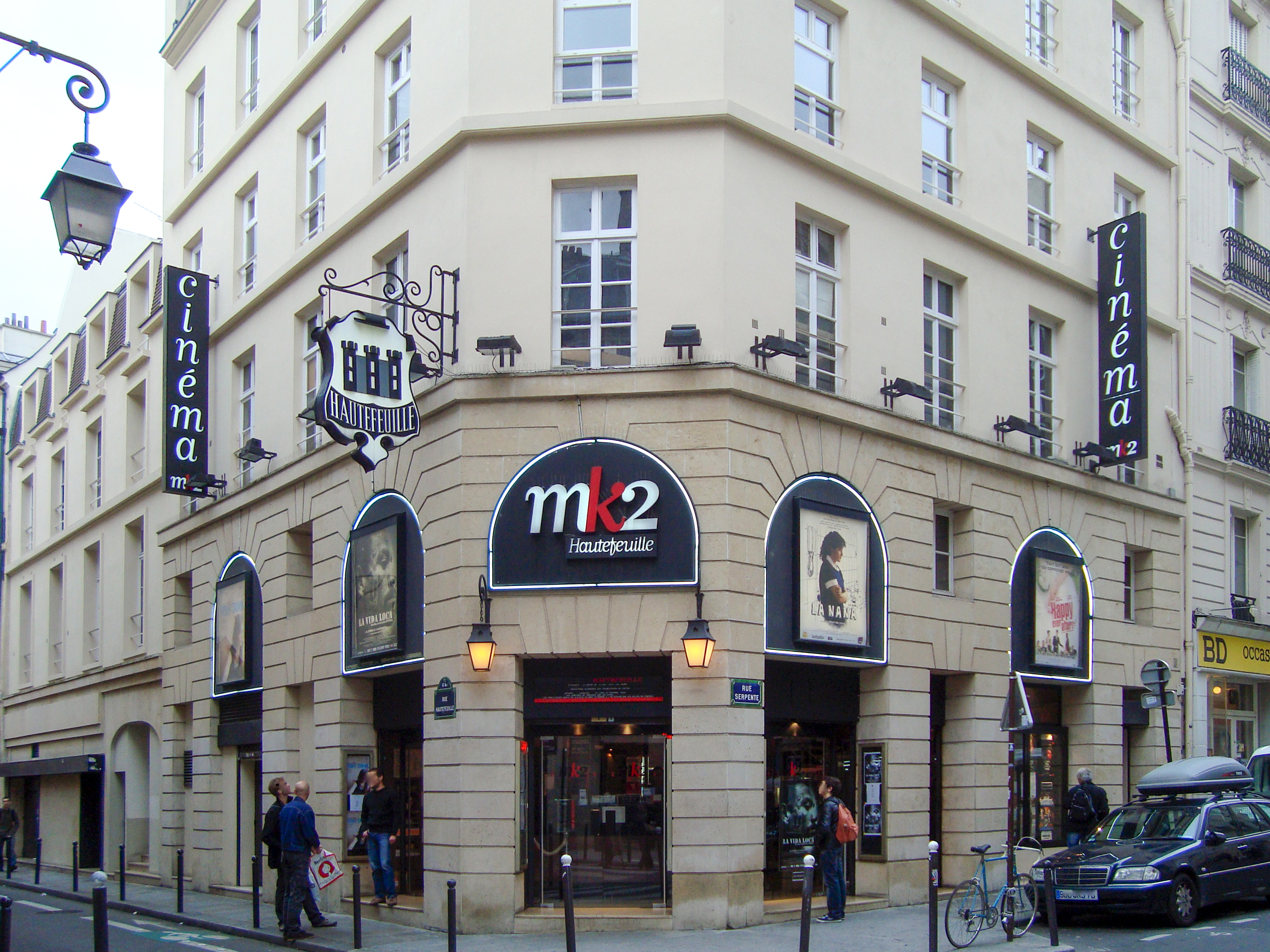 Le cinéma MK2 Hautefeuille dans le 6e arrondissement de Paris, à l'angle de la rue Serpente et de la rue Hautefeuille